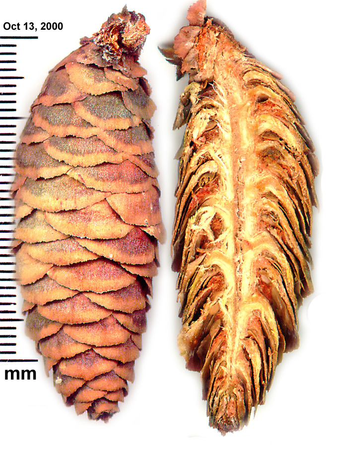 Шишарица оморике (изглед и уздужни пресек) скен Михаило Грбић